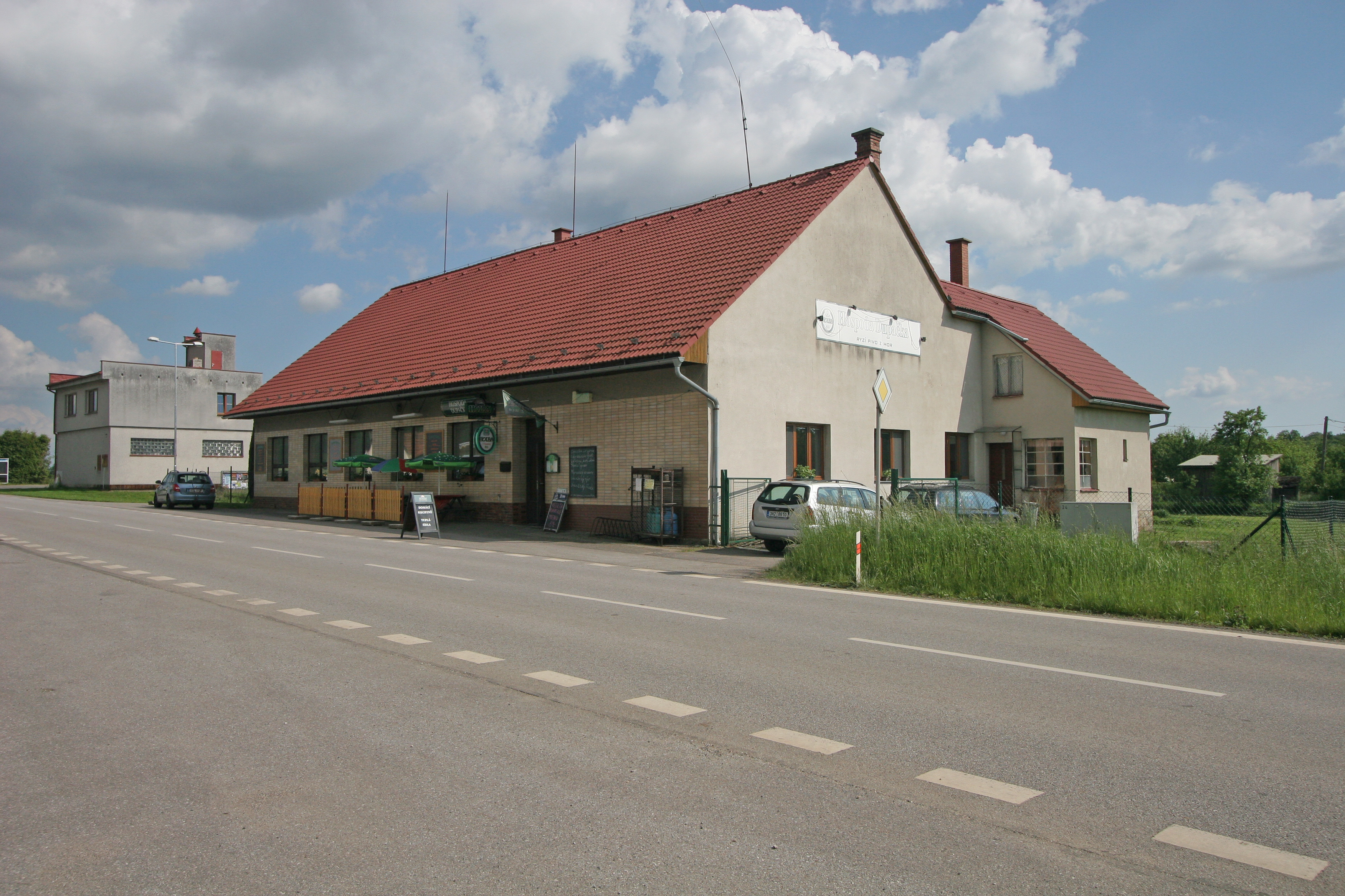 Tetín hospoda Dupačka